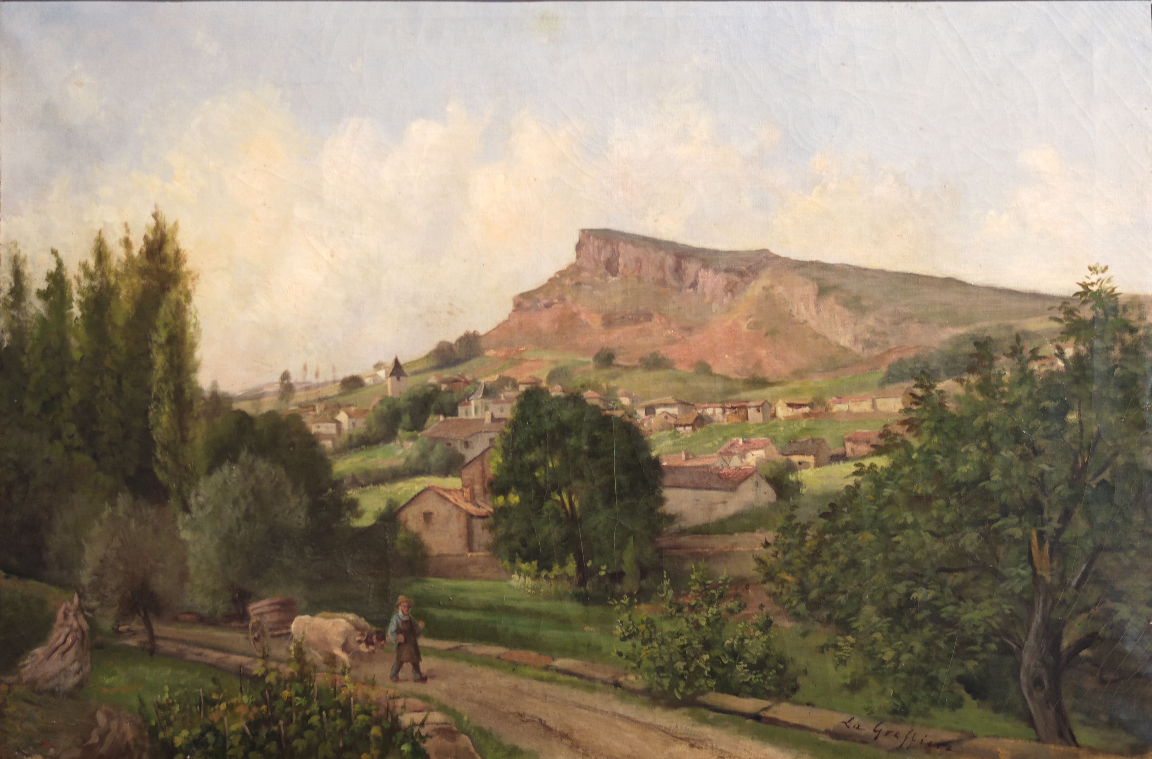 Vue de Solutré, huile sur toile (65 x 92 cm) par Alphonse Riballier (Mâcon 1830 - Paris 1894). S.b.d "La Greffière". Don de l'Académie de Mâcon en 1880. Musée des Ursulines de Mâcon. Inv A 1017 bis